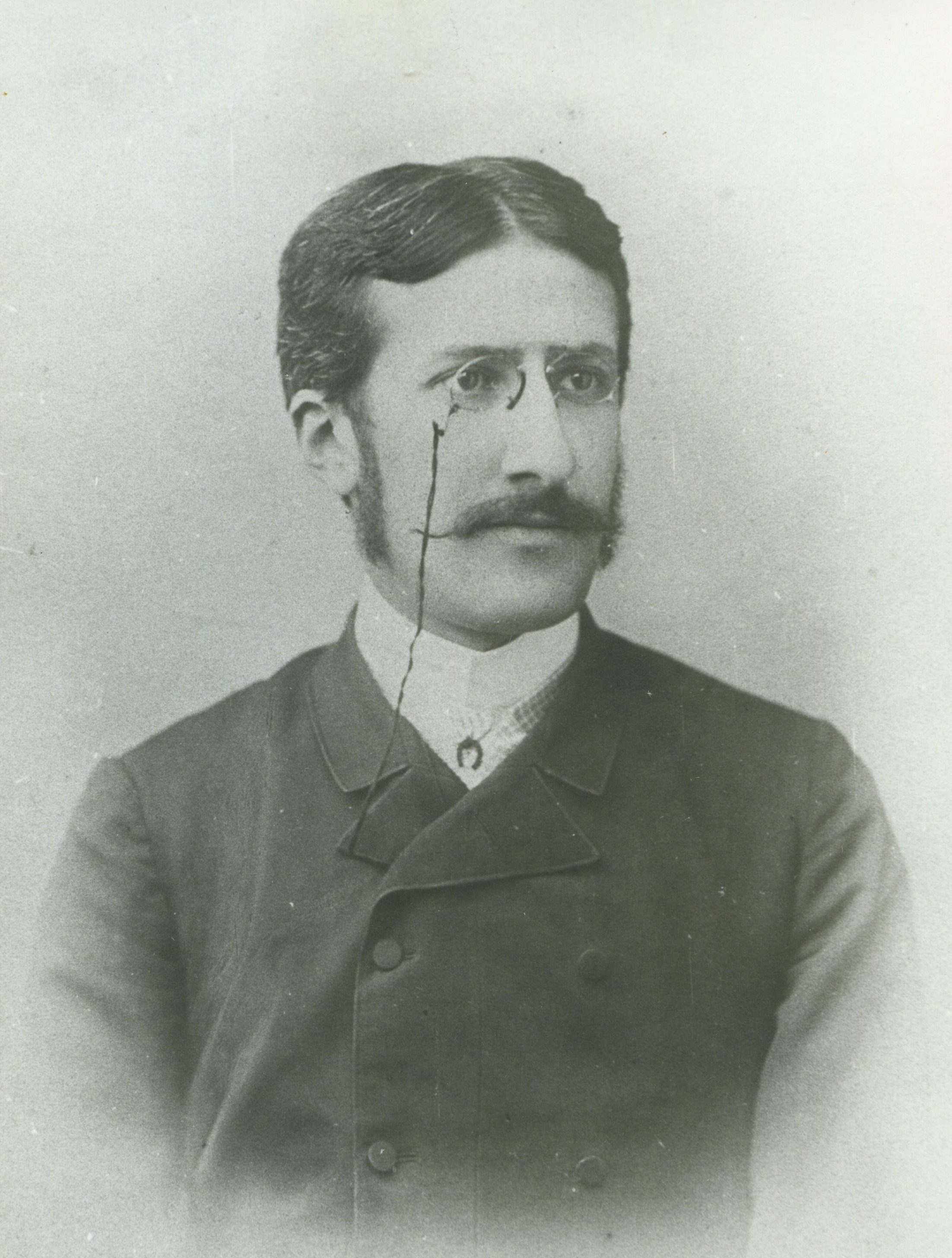 Adam Ostaszewski (1860-1934)